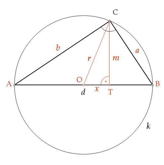 Thalész-tétel magyarázó ábrája